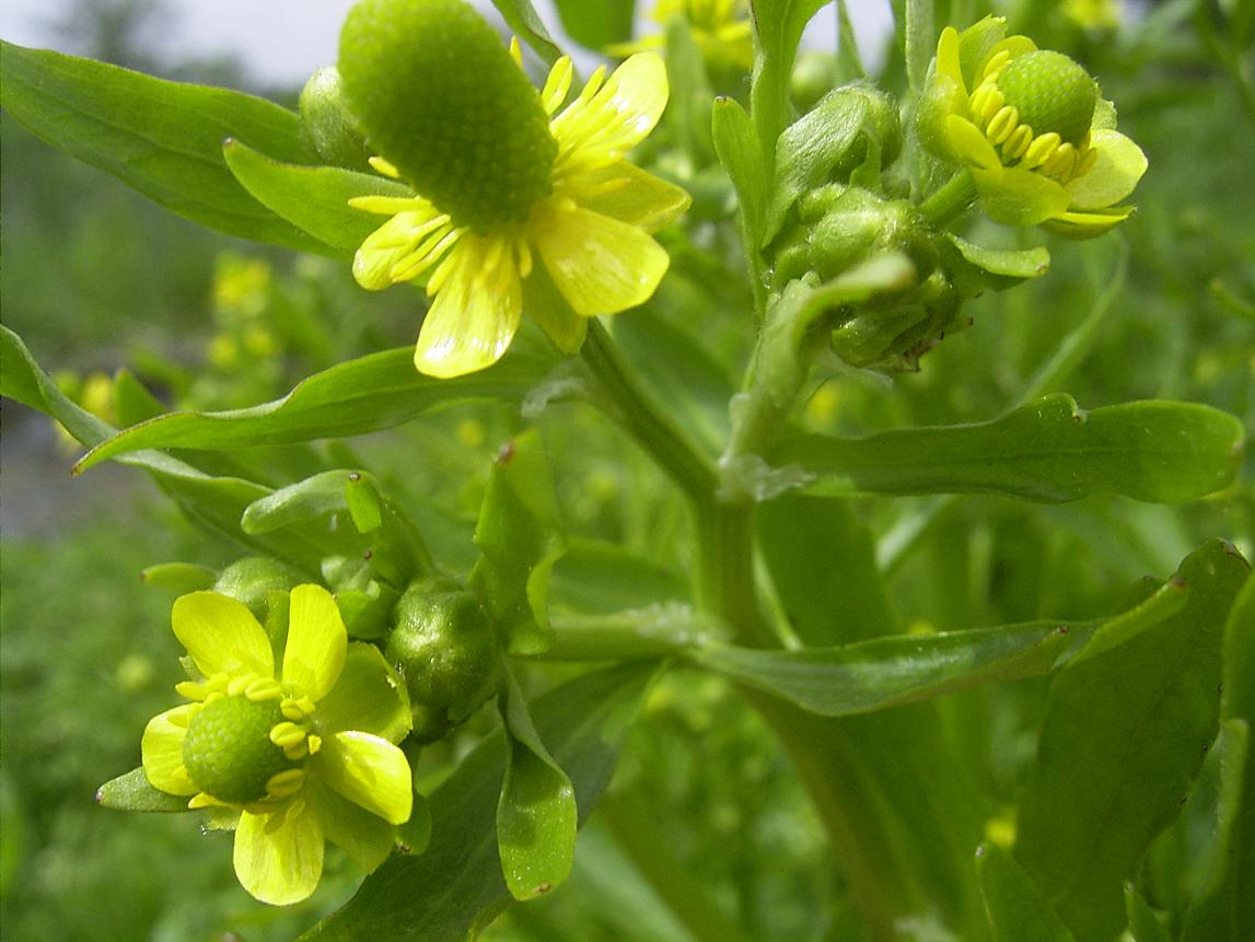 weiland bij Gouda, 11 mei 2004